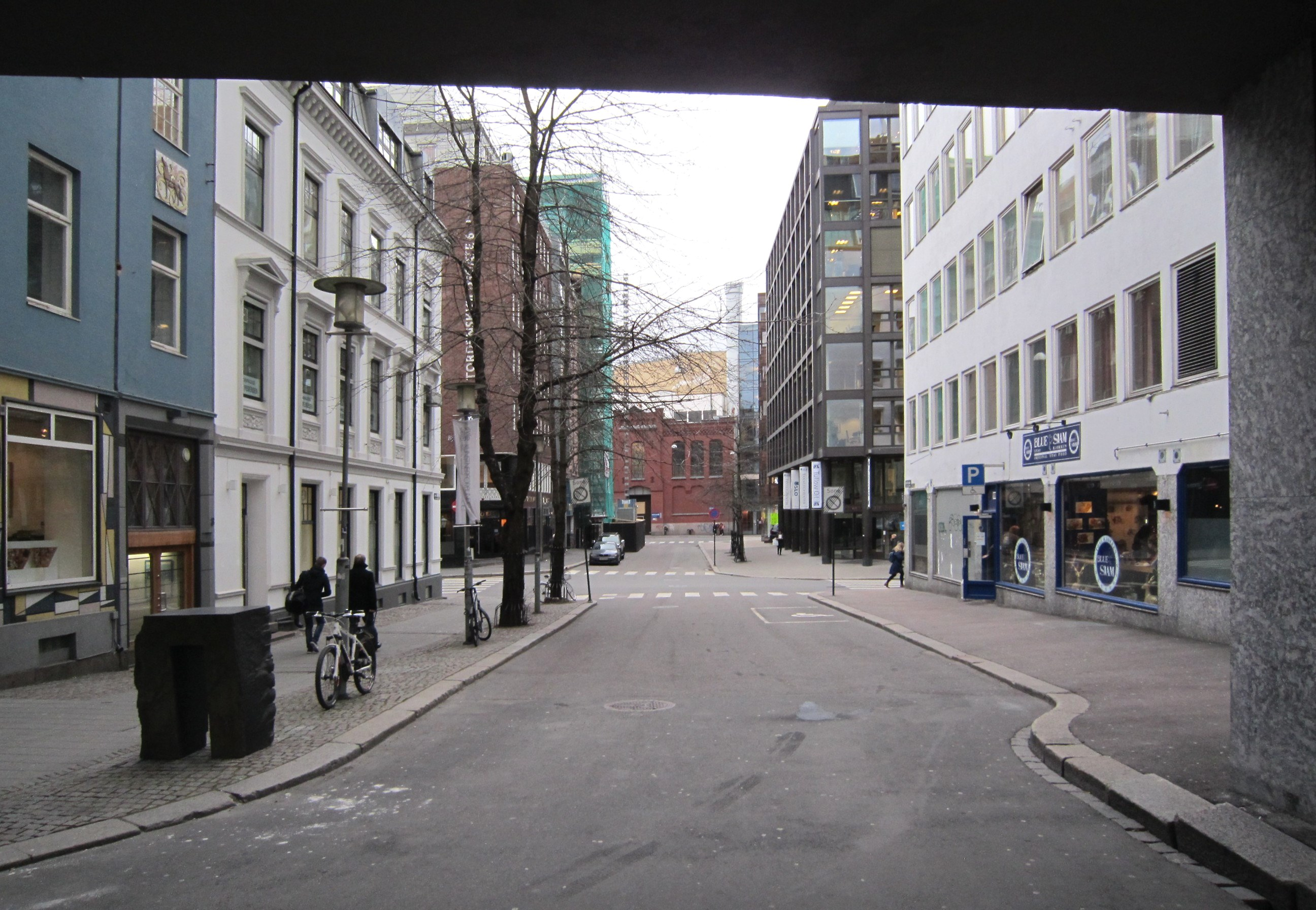 Kjeld Stubs gate ved siden av Oslo rådhus